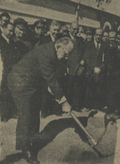 Başbakan Şükrü Saracoğlu, Anıtkabir'in temel atma töreninde